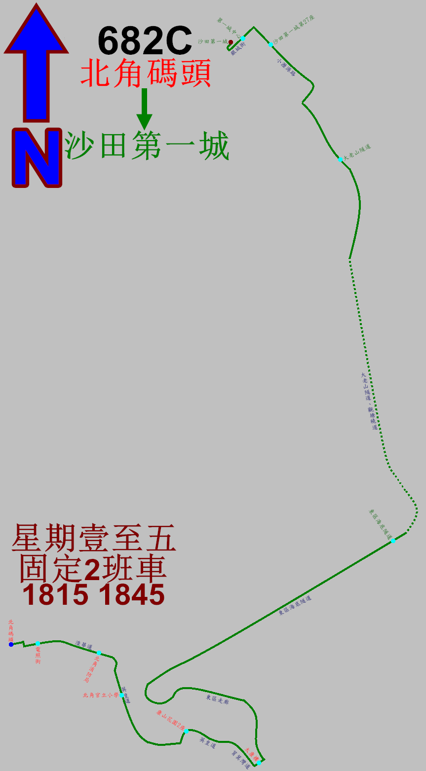 中文（香港）: 過海隧巴682C線沙田方向的走線圖